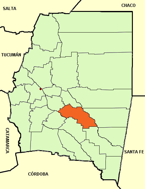 Departamento Mapa editado de: Santiago del Estero province (Argentina), departments and capital.png